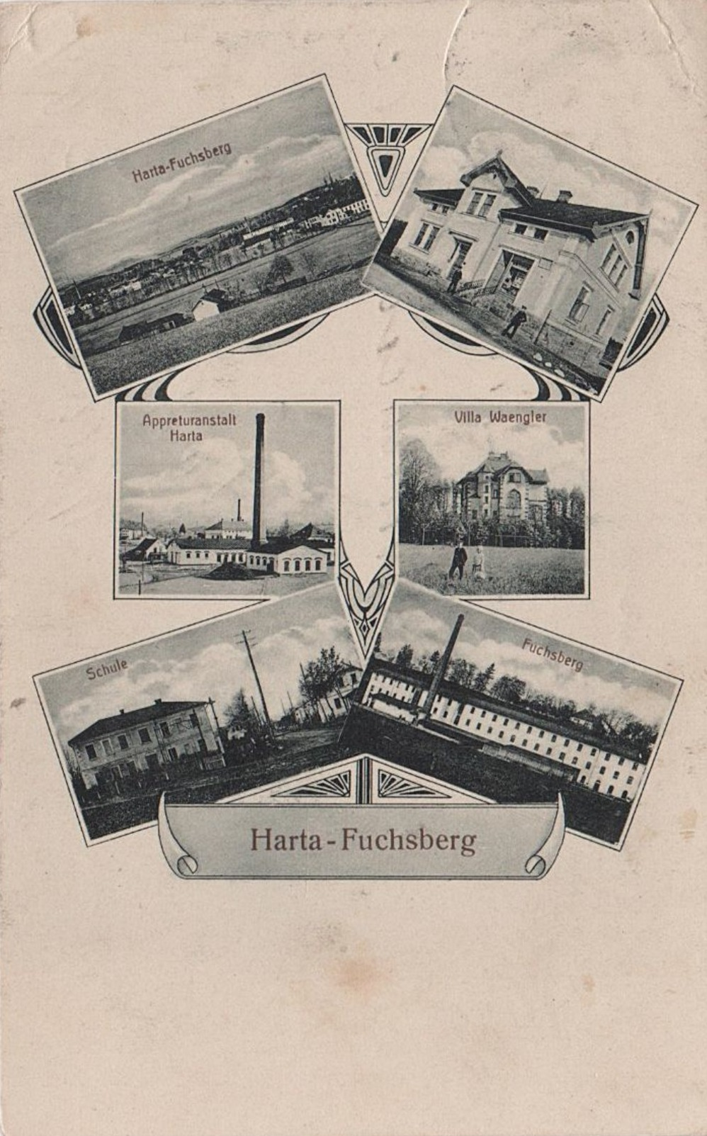 Bild der Weberei in Harta auf einer Ansichtskarte